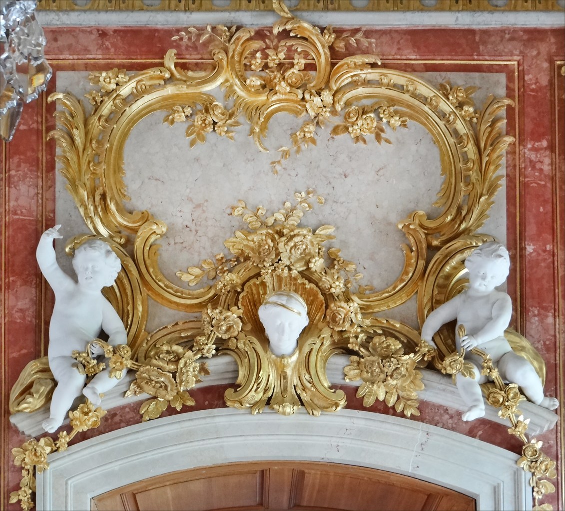 Décor de porte dans le salon d'or qui servait de salle du trône (1767) Les décors sur les murs, les stucs et allégories sont de J.M. Graff. ___________ Le palais de Rundale est l'un des monuments les plus remarquables de l'art baroque et rococo en Lettonie. Il a été construit entre 1736 et 1740 comme résidence d'été du duc de Courlande : Ernst Johann von Biron (1690-1772), favori de l'impératrice de Russie Anna Ioannovna (1693-1740). L'architecte italien Francesco Bartolomeo Rastrelli (1700-1771) a conçu le Palais de Rundale et en a supervisé les travaux de construction. Il est l'architecte de nombreux bâtiments officiels de Saint Pétersbourg. Après la mort de l'impératrice Anna Ioannovna, le duc a été arrêté et envoyé en exil en Sibérie. Les travaux de construction du palais ont repris après le retour du duc en 1763 au début du règne de l'impératrice Catherine II. La majeure partie de l'intérieur du palais a été créée entre 1765 et 1768. Les maîtres italiens de Saint-Pétersbourg : Martini Francesco et Carlo Zucchi sont les auteurs des peintures sur les plafonds et les murs tandis que le sculpteur Johann Michael Graff de Berlin a fait les décorations en stuc sur fond de marbre artificiel. Article de Wikipedia sur Biron Article de Wikipedia sur le palais Site du palais de Rundale (en)